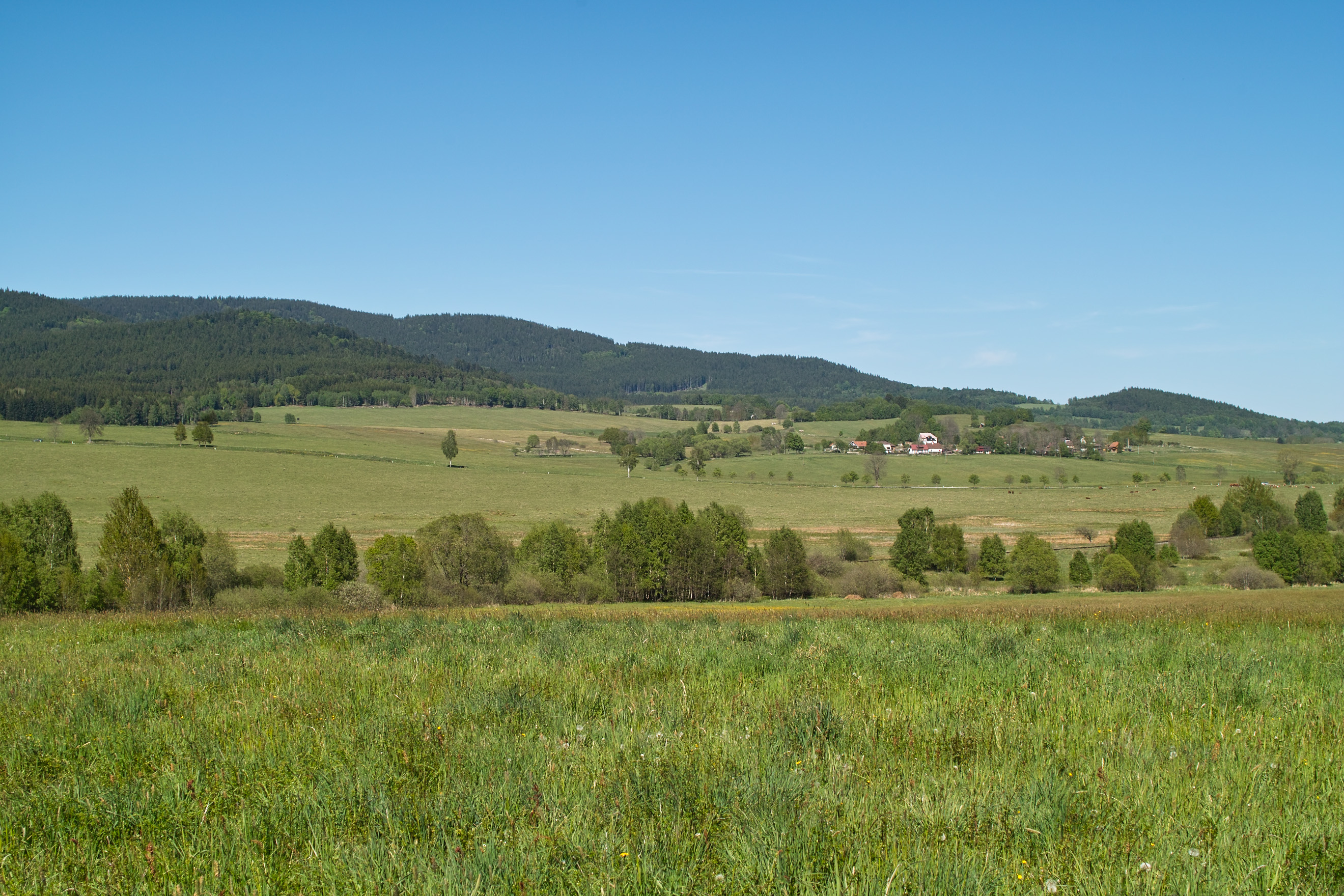 Maňava u Horní Plané a Telecí vrch - 844 m. n. m. (nad Maňavou). Vlevo od Maňavy: Nad Starou Hutí (1048 m. n. m.), 1173 m. n. m., Špičák (1216 m. n. m.), před ním 1001 m. n. m., dále Kapradinec 1083 - 1097 m. n. m. - vrchy ve vojenském újezdu Boletice.